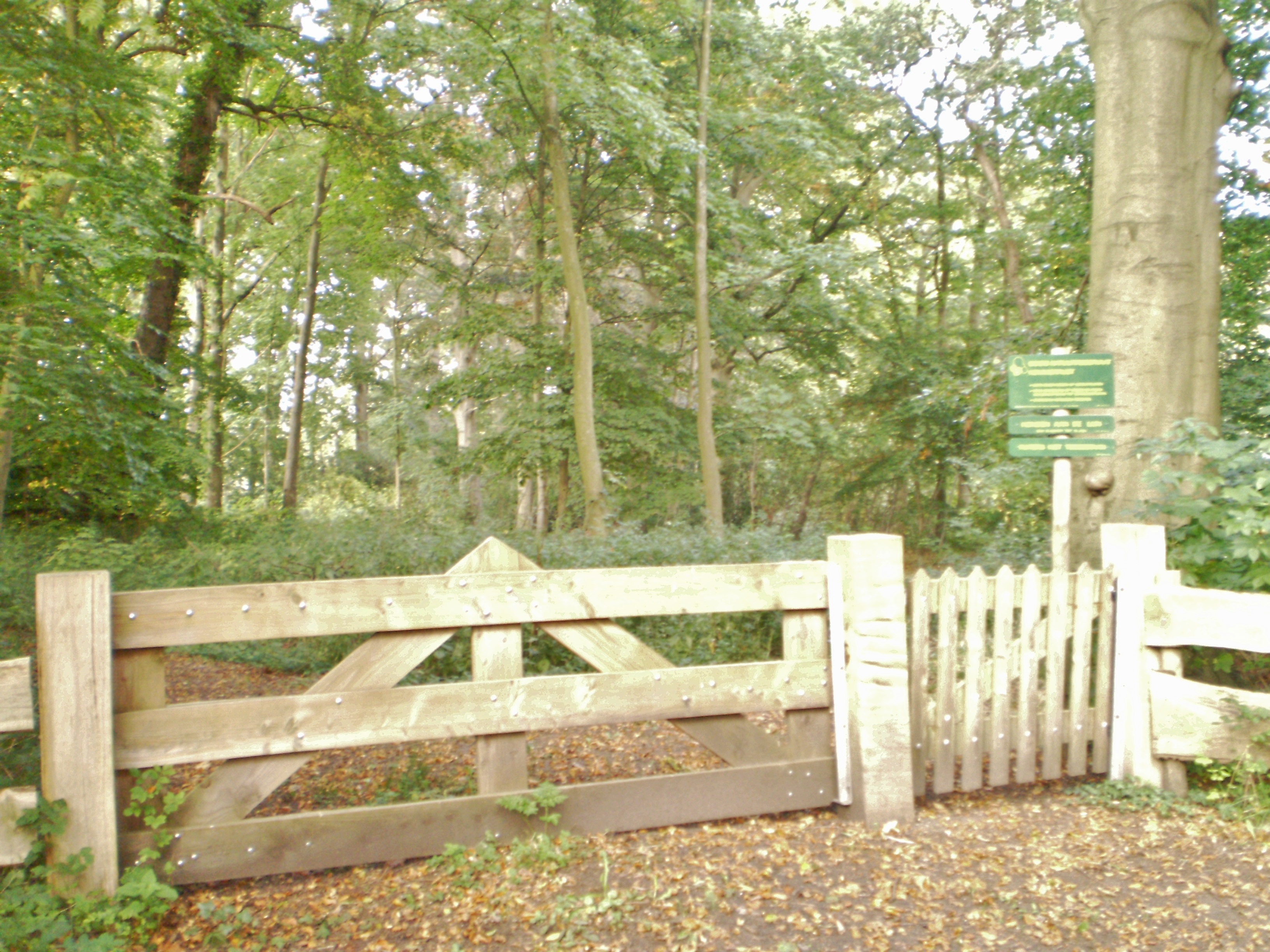 Kommerrust, toegangshek